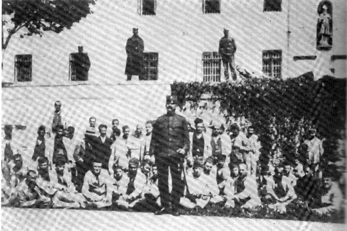 Srpskohrvatski / српскохрватски: Grupa političkih osuđenika u lepoglavskoj kaznioni.